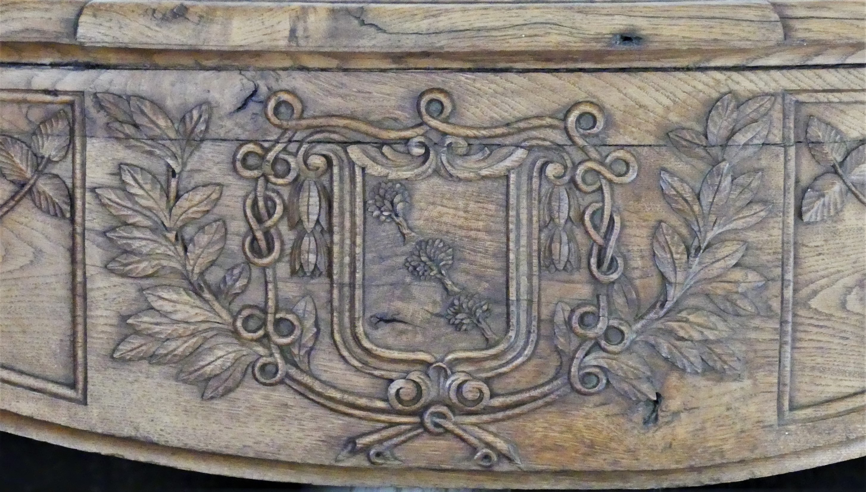 Manteau de cheminée sculpté avec les armoiries de Chénérailles, Creuse, France.